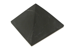 A pyramid of shungite collected on Zazhoginskoye field. Produced by Karelian Horizon company